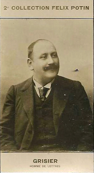 Grisier, Georges